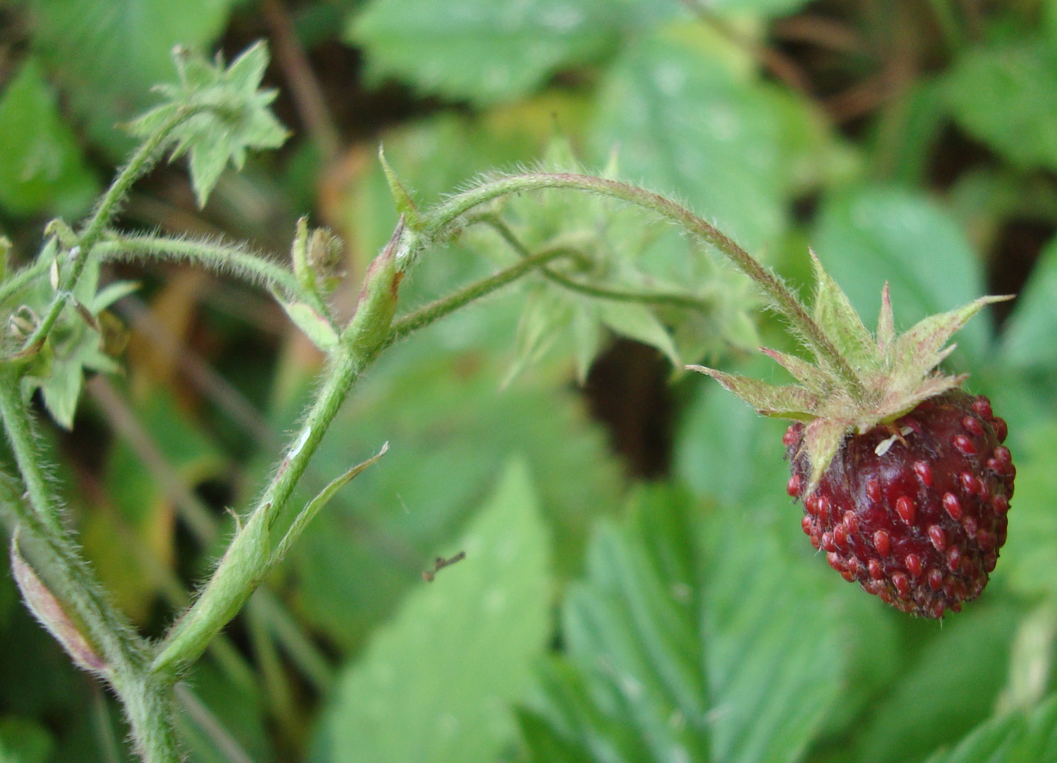 Jahodník truskavec plod detail